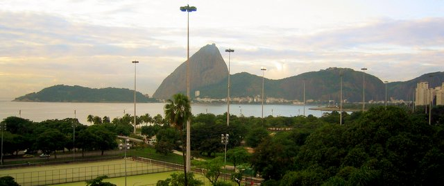 Vista do Hotel Novo Mundo. Estadia no Rio de Janeiro para a reunião do Overmundo